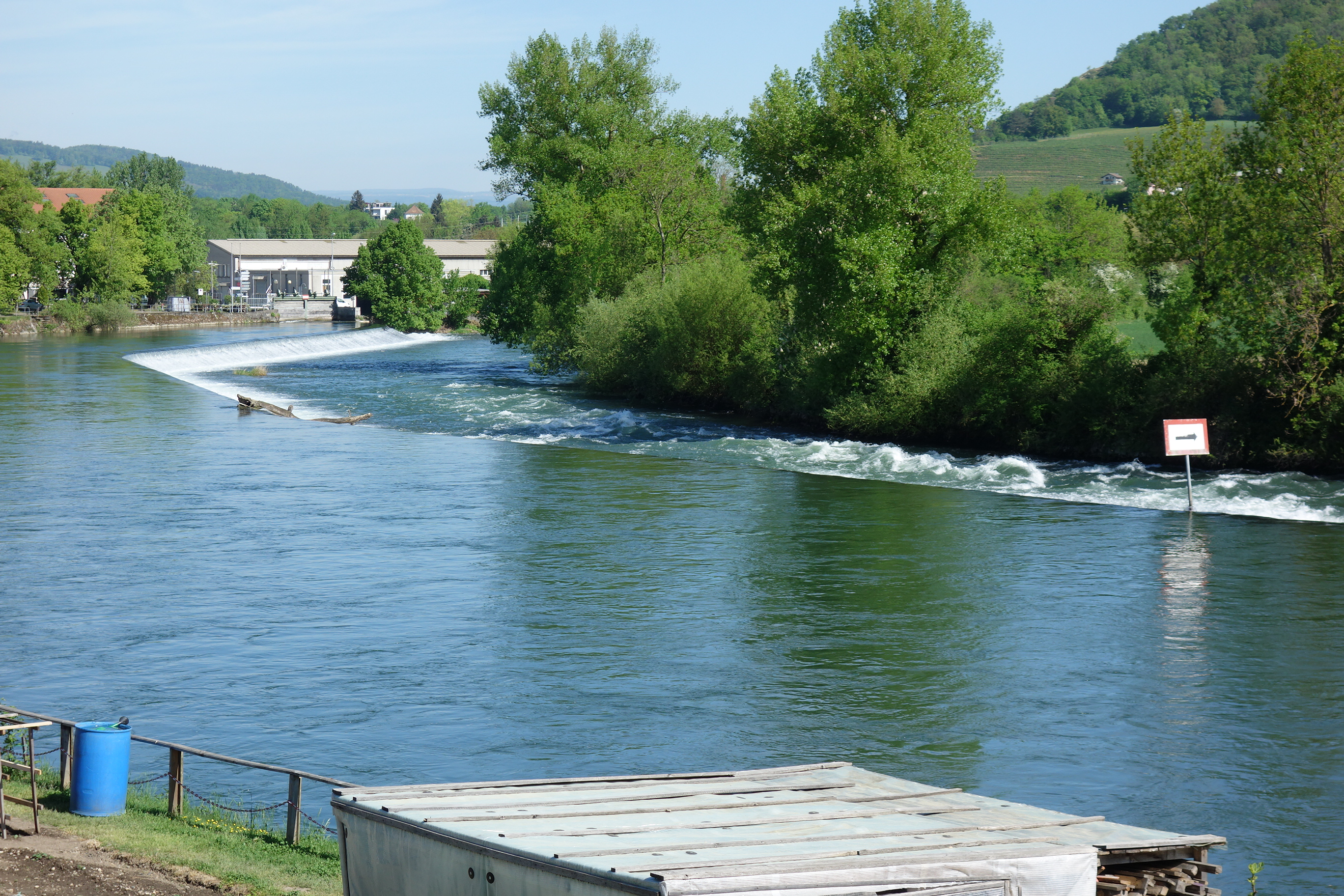 Kraftwerk Gebenstorf, Vogelsang Gebenstorf AG, Schweiz